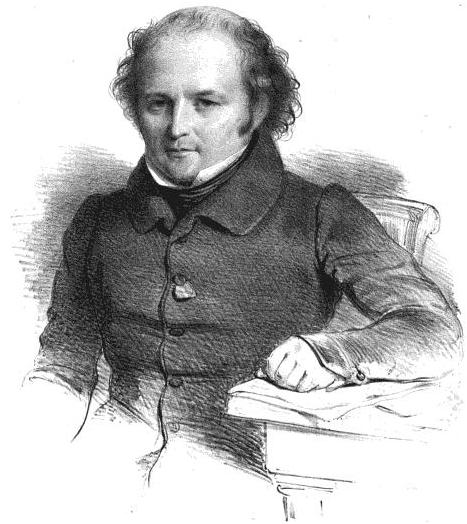 Louis-Augustin-François Cauchois-Lemaire.